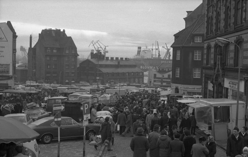 Hamburg Fischmarkt